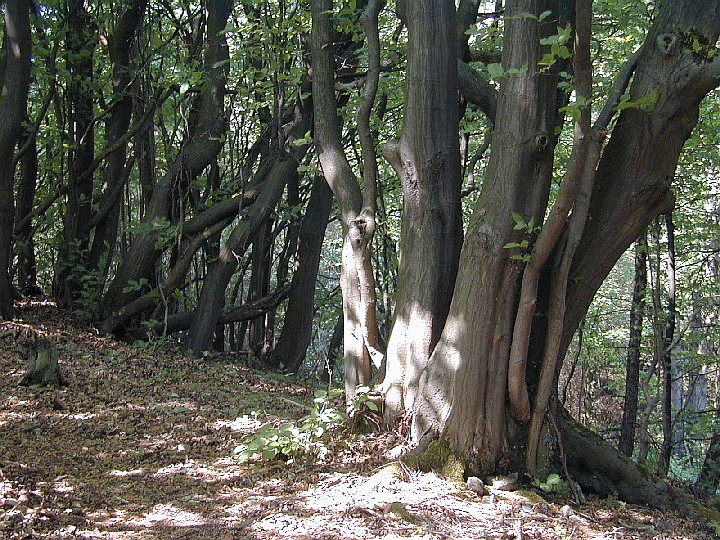 Niederwald aus Hainbuche (Carpinus betulus) in Niedersachsen